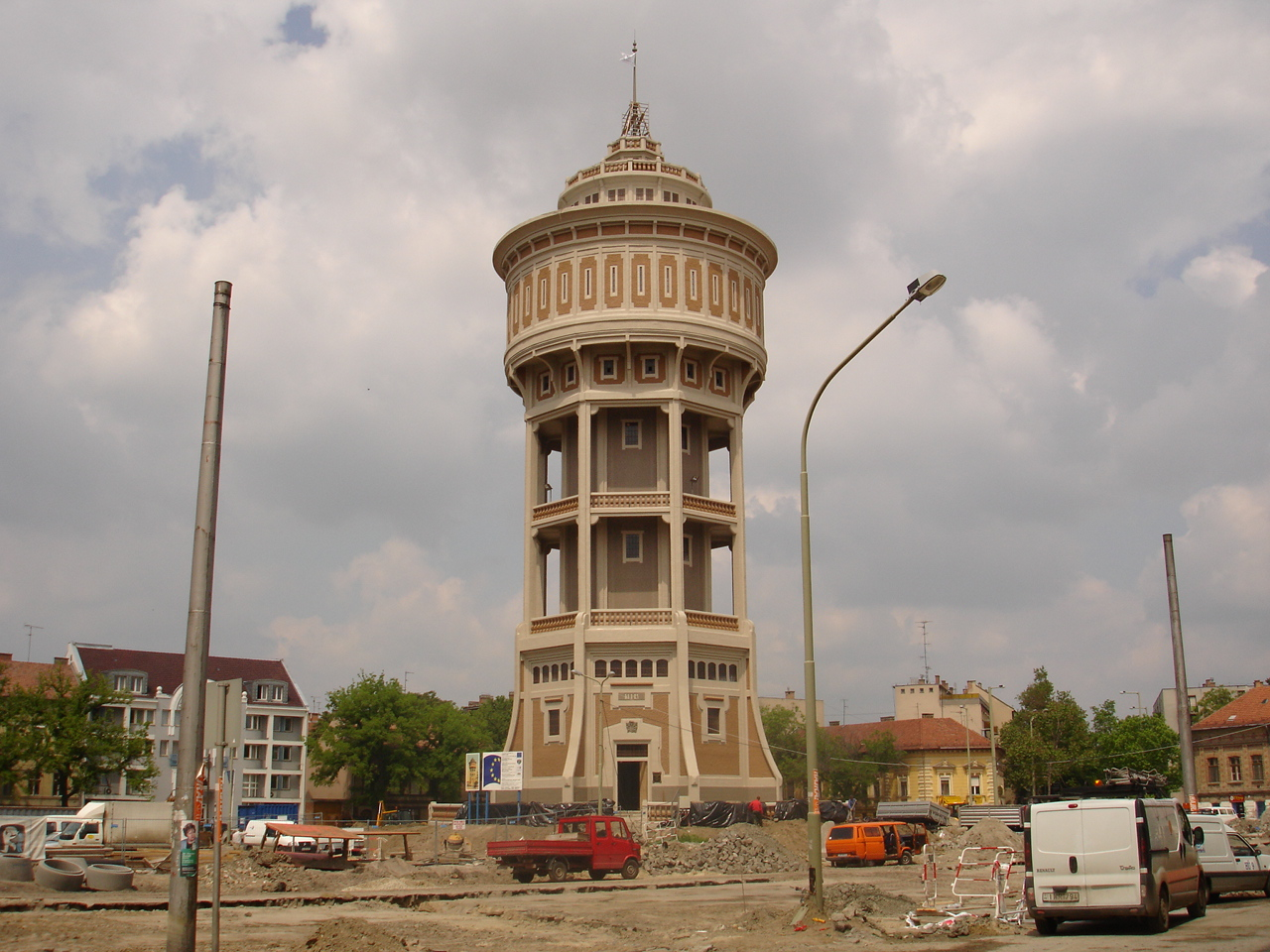 Az "Öreg Hölgy", a szegedi víztorony rekonstrukciója és a tér rehabilitációja 2005 májusában. A téren az alapközművek cseréje, térvilágítás, burkolatcsere történt. A tér arculata átalakult pihenőhellyé, padok elhelyezésével. Megépült a mérnök pantheon és a szökökút.